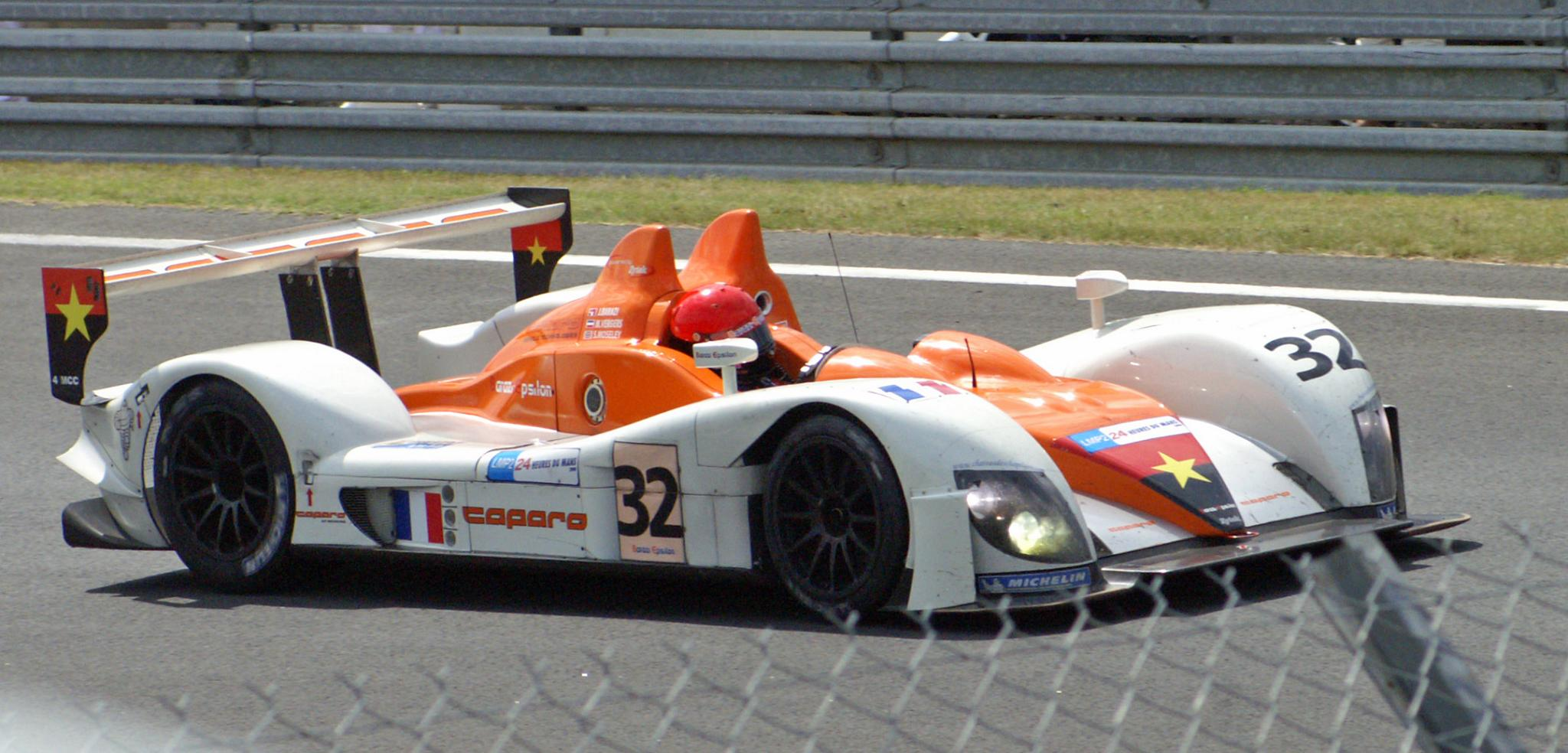 Le mans 24 hours 2008